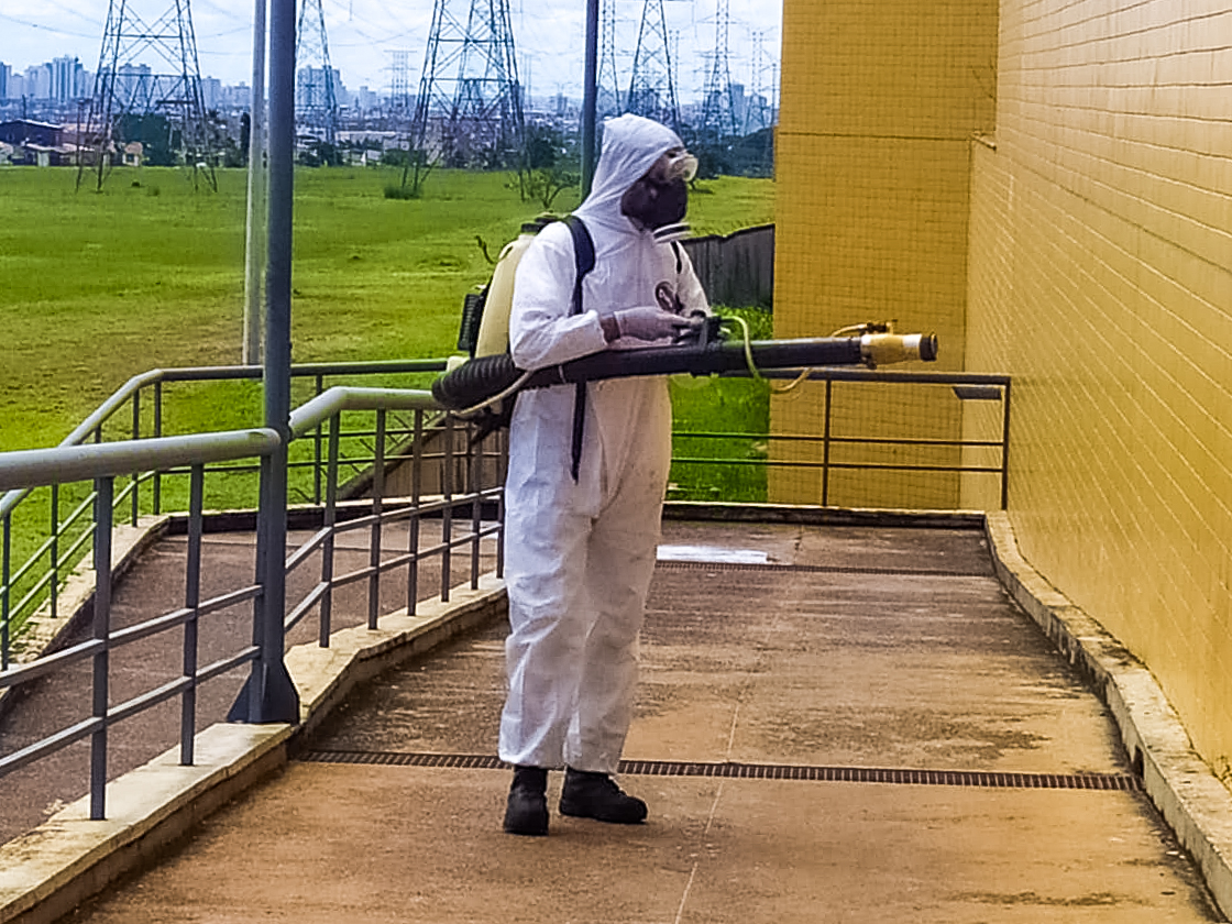 Samambaia está recebendo nesta segunda (13/04) e terça (14/04) as equipes do programa Sanear-DF para reforçar a desinfecção de áreas contra o novo coronavírus. A ação também vai se concentrar no recolhimento de entulho, e eliminação de focos do mosquito Aedes aegypti, causador da dengue. Mais de 150 servidores foram destacados para trabalhar no local, na foto limpeza da Estação do Metro.Fotos Divulgação